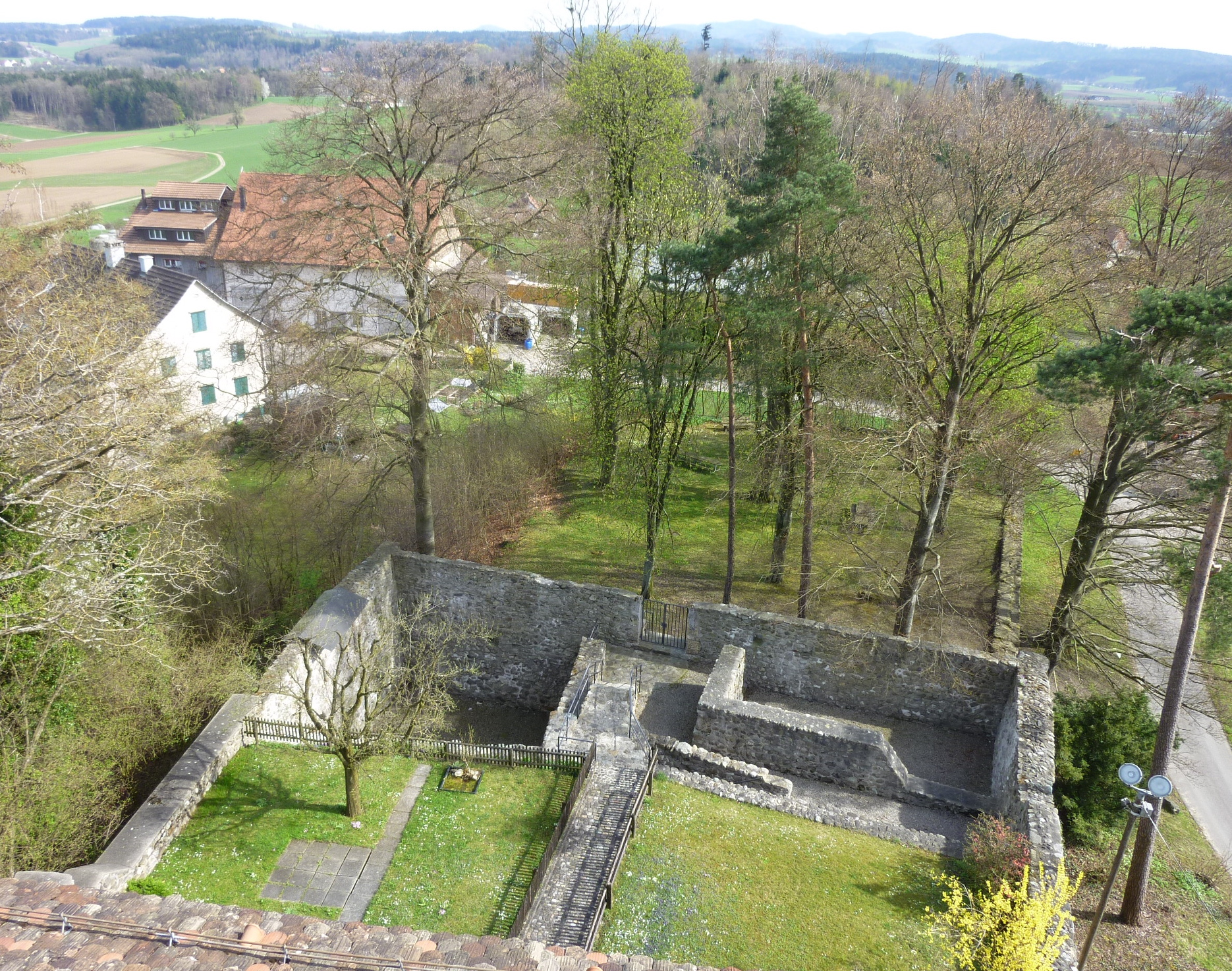 Schloss Mörsburg Garten und Reste der Vorburg